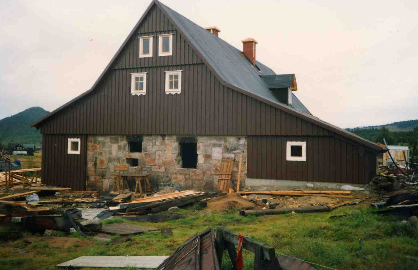 Neues Misthaus2